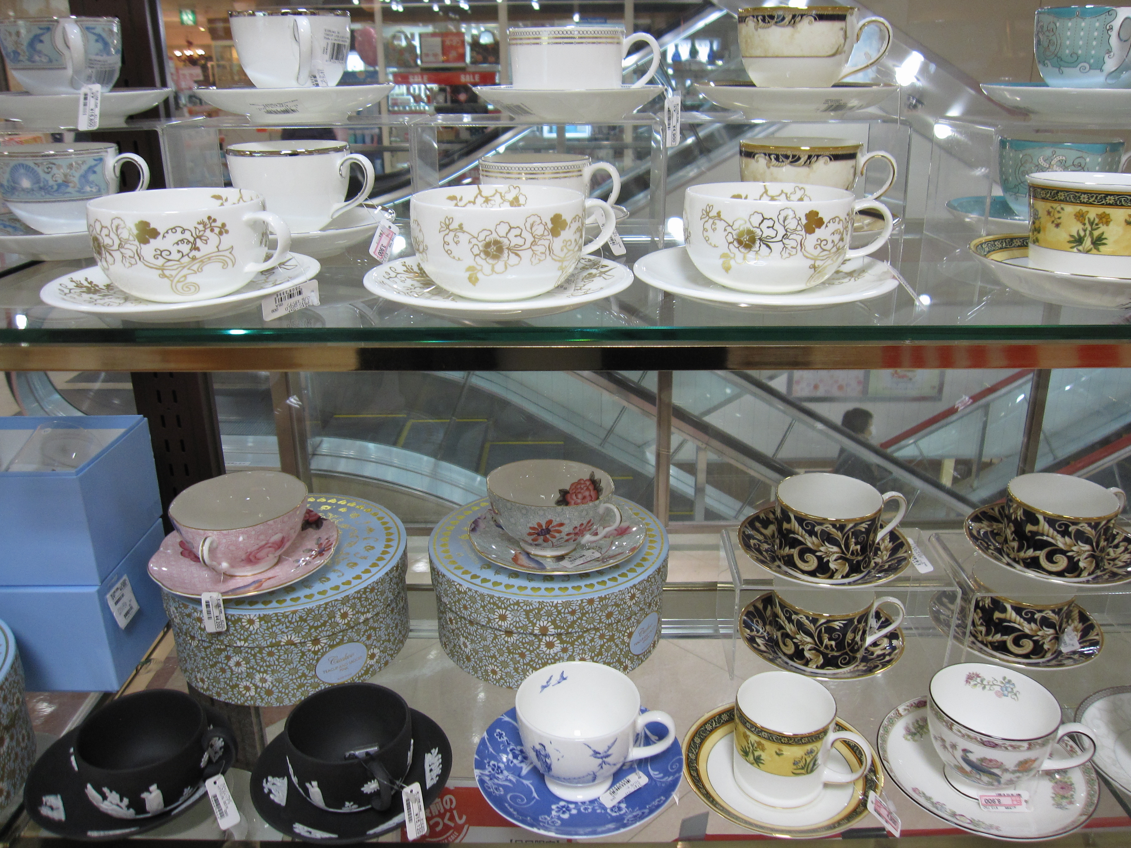 Wedgwood